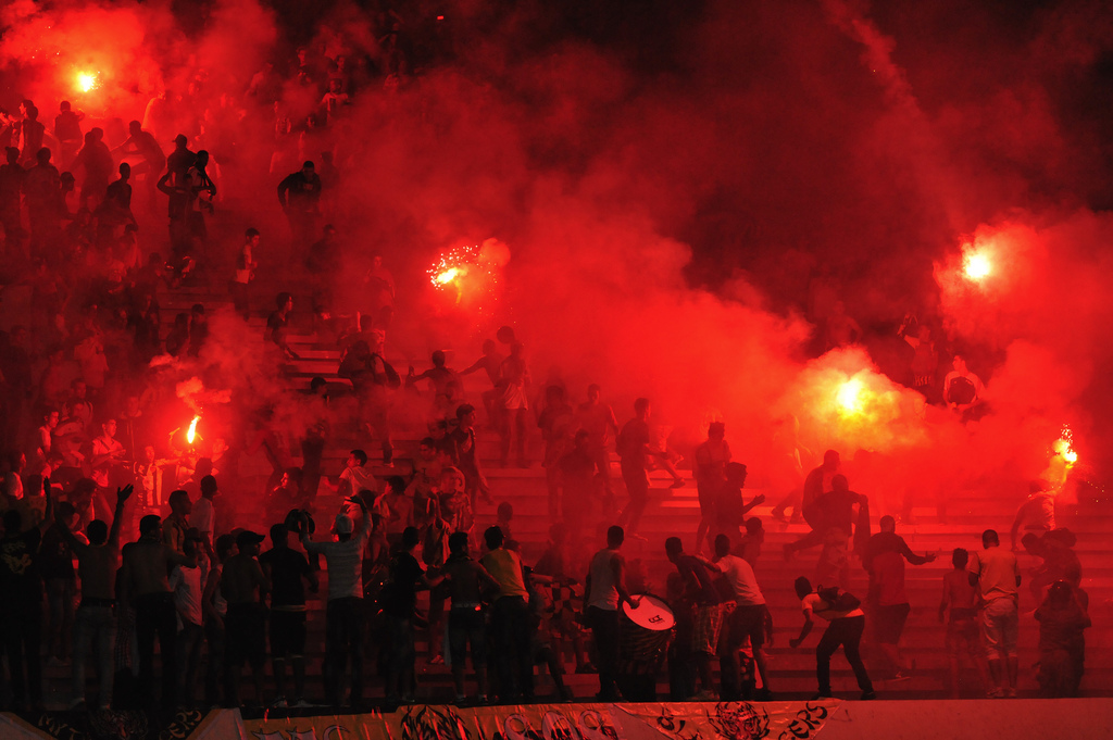 RCA vs MAS